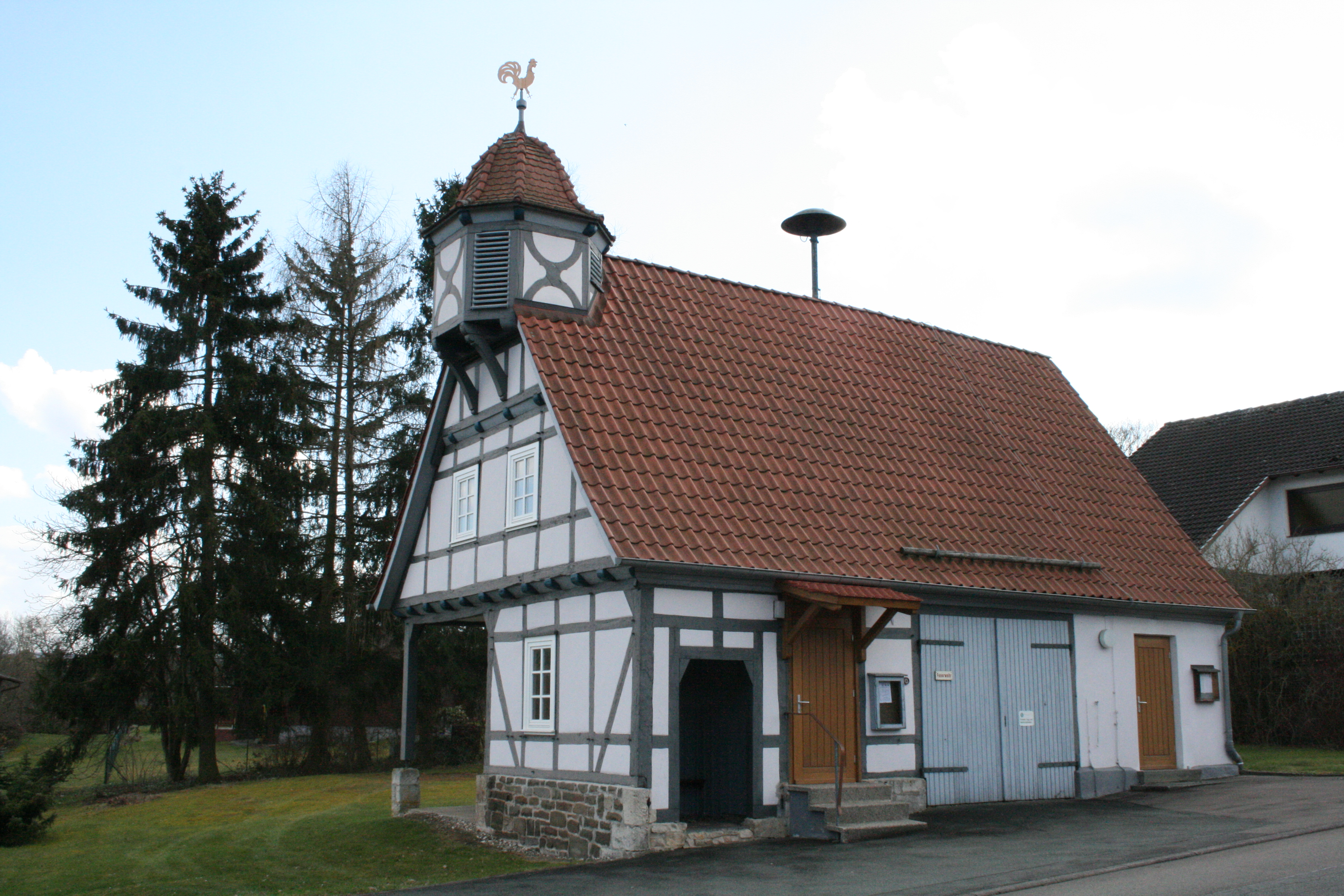 Kirche in Asel - Orstteil von Vöhl